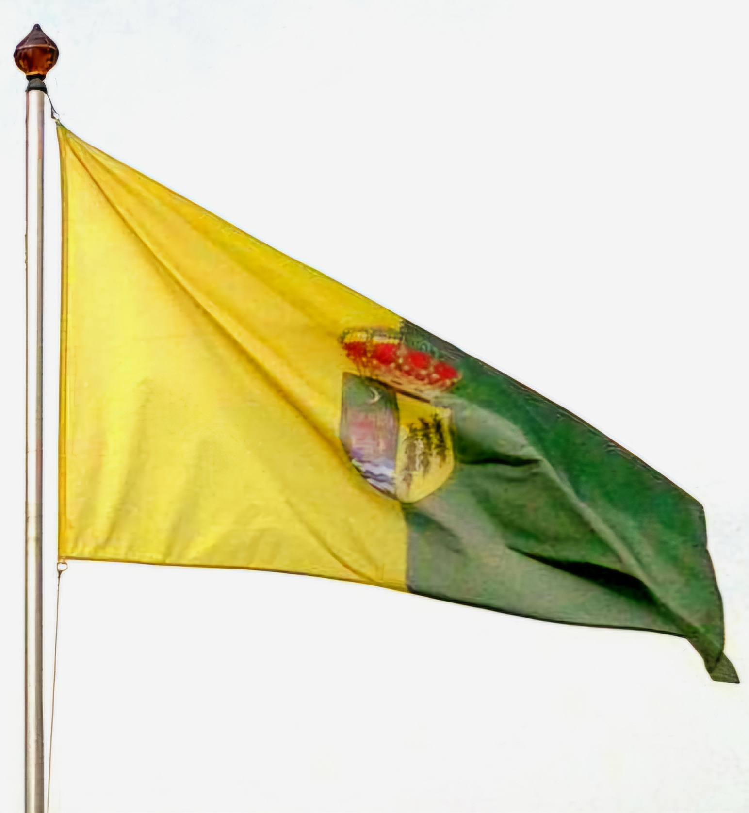 Vista de la bandera de Láchar (provincia de Granada, España) ondeando en su ayuntamiento.